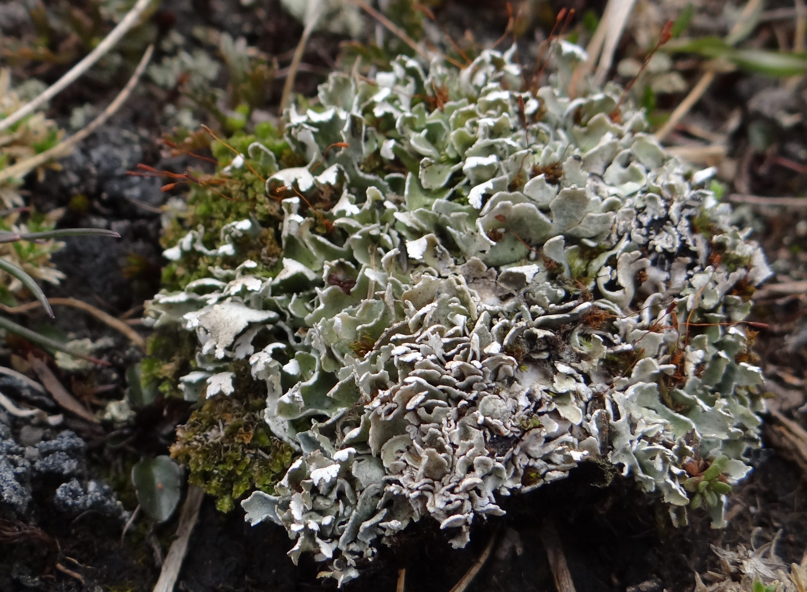 Cladonia pocillum (location: Tatra Mountains, Małołączniak)